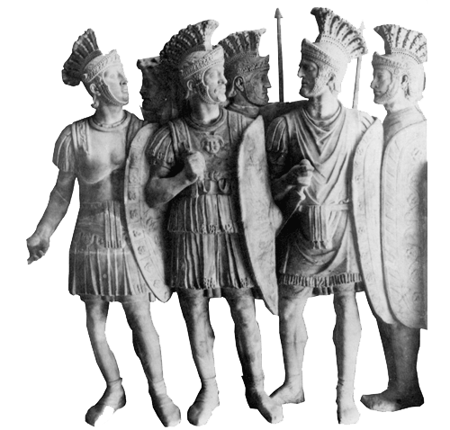 Roman soldiers